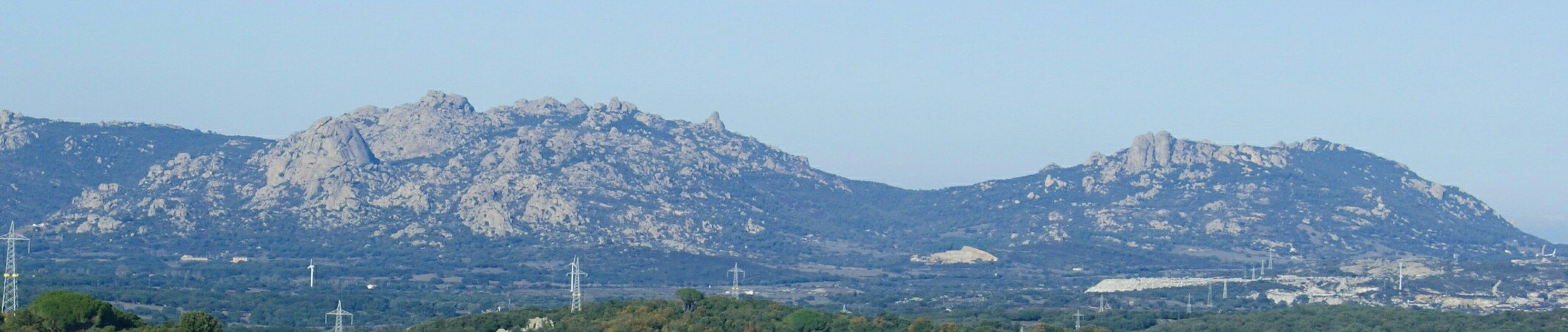 Colline di granito